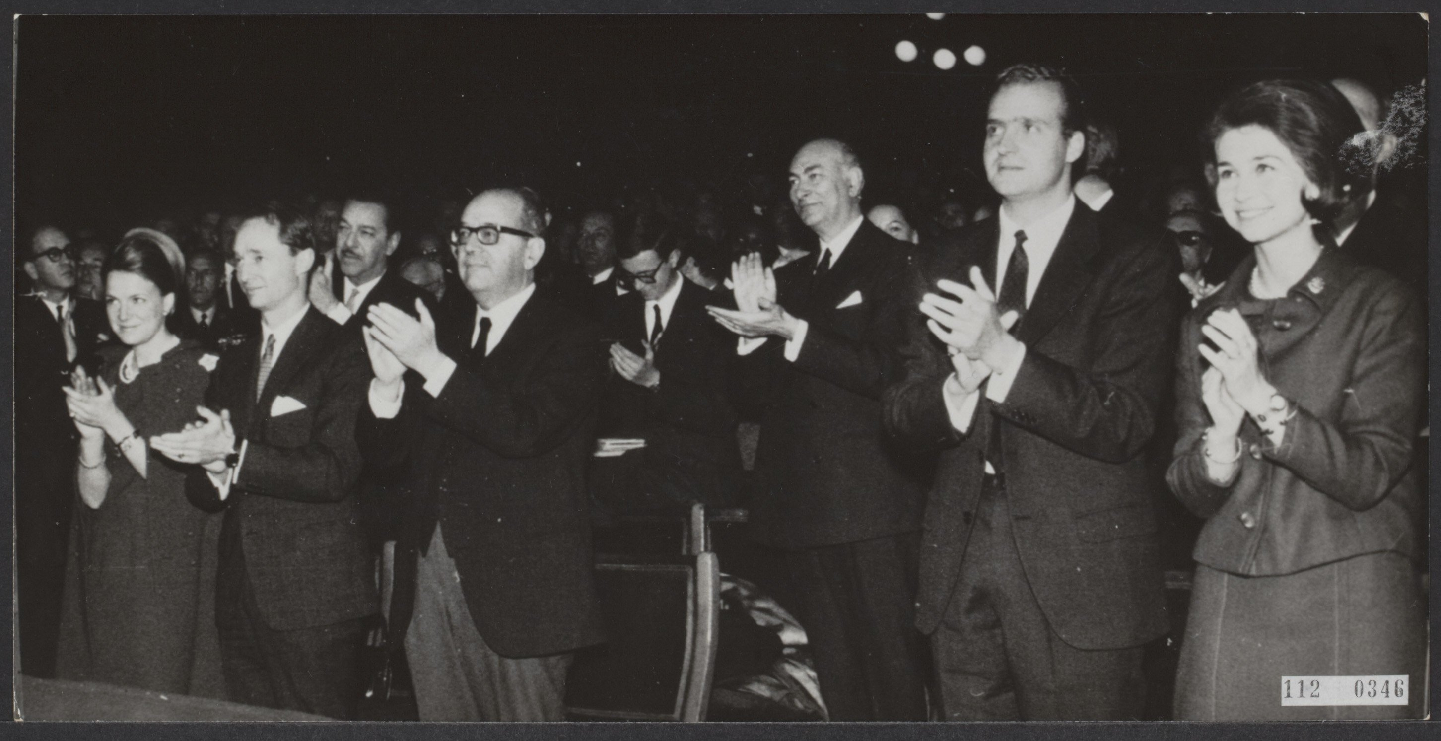 Collectie / Archief : Fotocollectie Elsevier Reportage / Serie : [ onbekend ] Beschrijving : Bij een lezing van Dr. Konrad Adenauer waren onder zijn gehoor (links) prinses Irene en prins Carel Hugo van Bourbon, die door de Carlisten als troonopvolger naar voren wordt gebracht. (Rechts) Prins Juan Carlos de Bourbon en zijn echtgenote prinses Sophia. Van deze Juan Carlos wordt aangenomen dat hij door Franco als de troonopvolger wordt gezien Datum : 20 februari 1967 Locatie : Madrid, Spanje Trefwoorden : lezignen, prinsen, prinsessen, publiek Persoonsnaam : Carel Hugo prins, Irene, prinses, Juan Carlos prins, Sofia, prinses van Griekenland Fotograaf : [onbekend] Auteursrechthebbende : Nationaal Archief Materiaalsoort : Foto (zwart/wit) Nummer archiefinventaris : bekijk toegang 2.24.05.02 Bestanddeelnummer : 112-0346